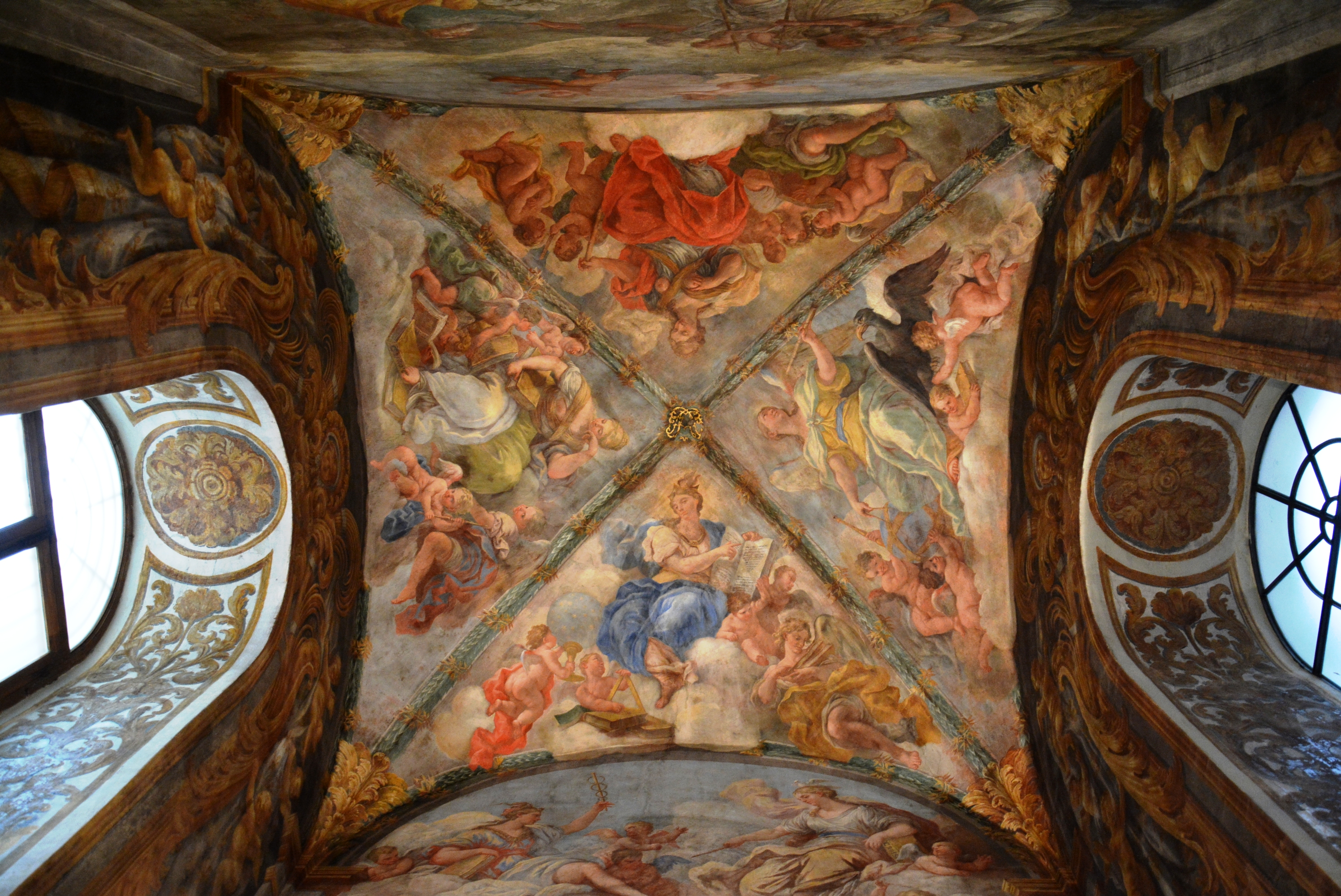 Chiesa di Santa Maria del Parto a Mergellina, a Napoli